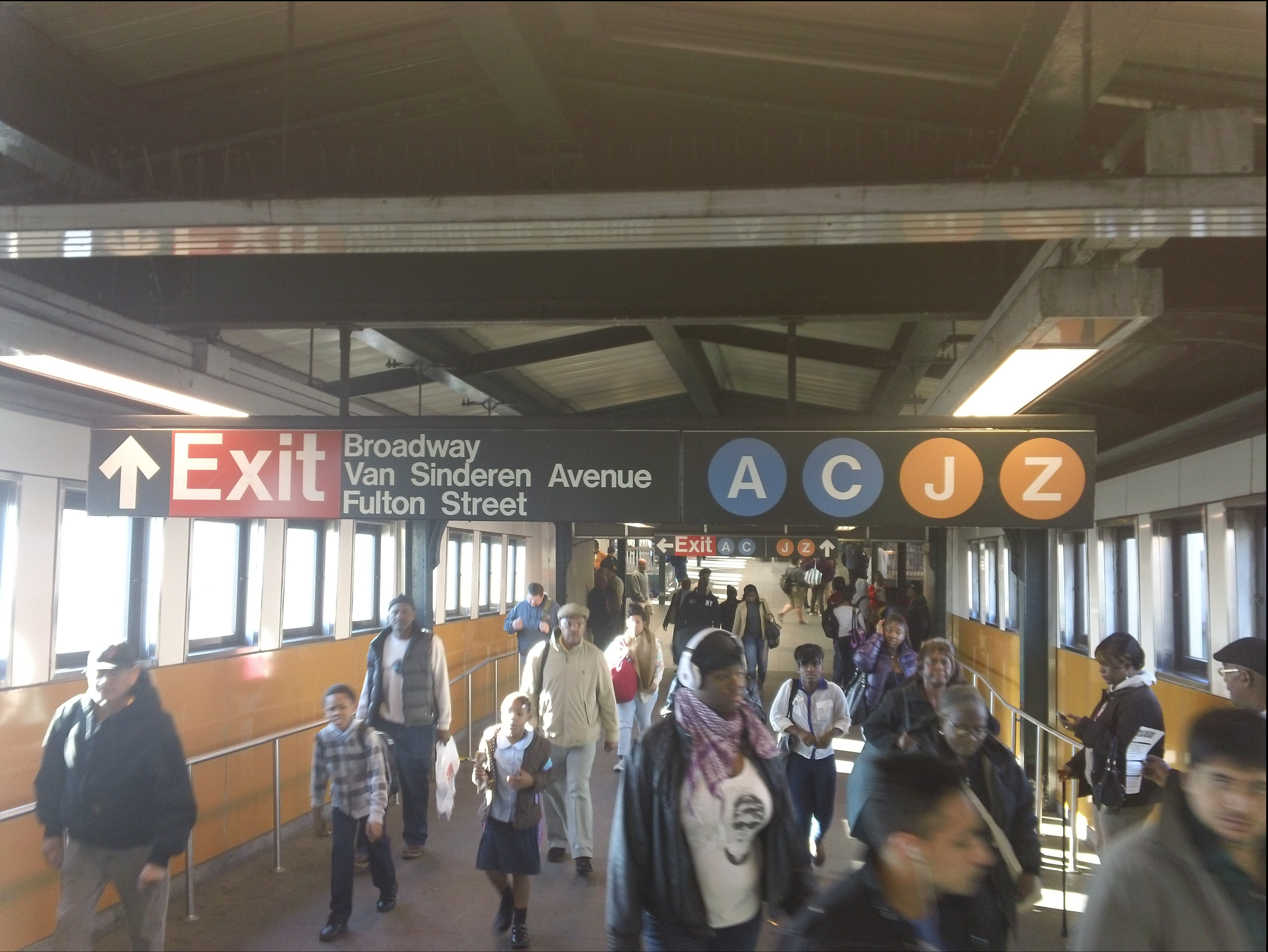 Brooklyn and Queens